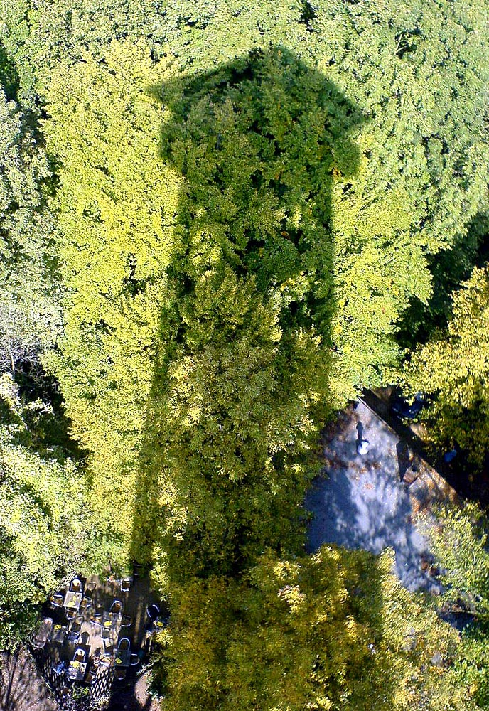 Goetheturm Frankfurt am Main/Sachsenhausen. Zur Veranschaulichung der Größe: Blick auf den umgebenden Buchenmischwald.